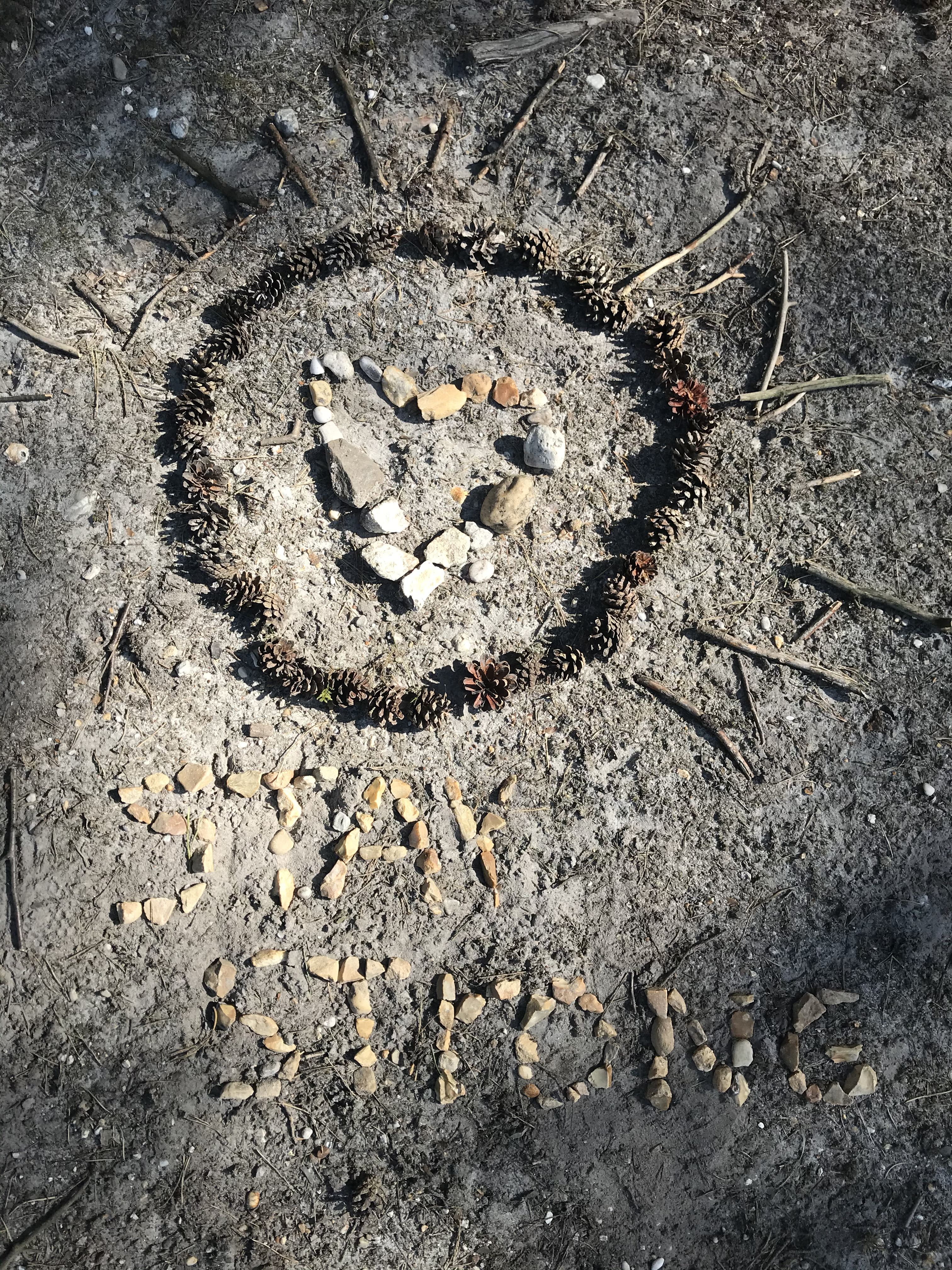 during Covid 19 saw this in the forest